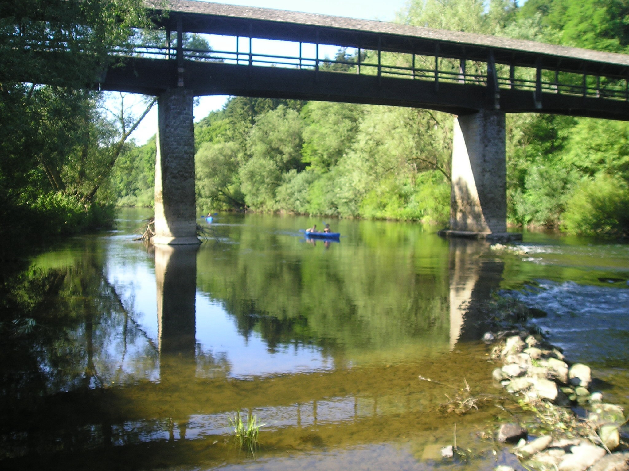 Albert-Toepfer-Brücke in Weilerbach über der Sauer